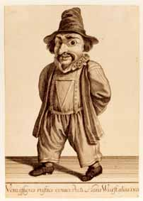 Dit is een afbeelding van Hansworst of Hanswurst, een figuur uit het poppentheater. De afbeeling is in bezit van het Duitse Theatermuseum en wordt door het museum gedateerd in de 19e eeuw. Een maker is niet bekend.